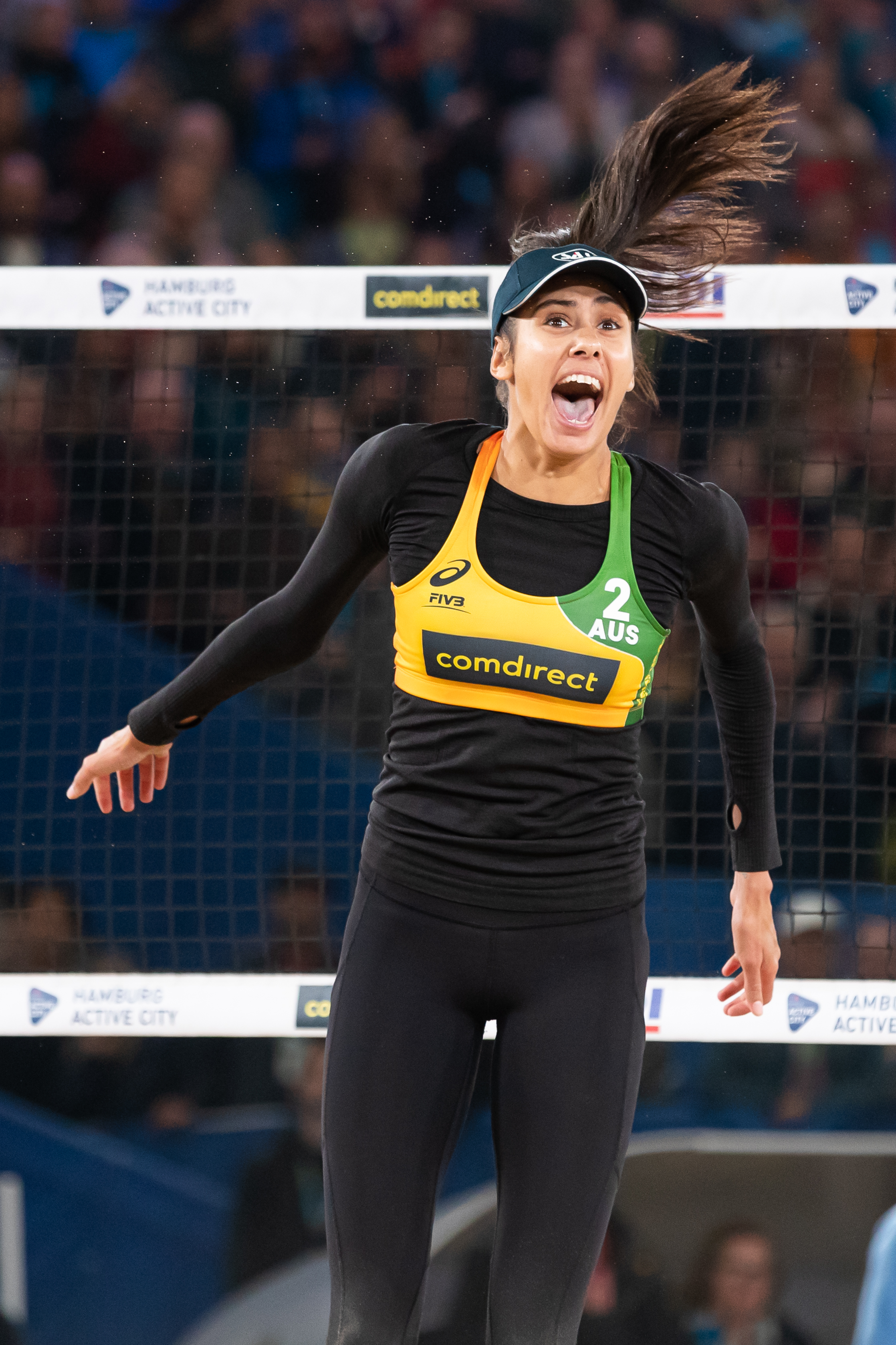 BeachVolleyball Weltmeisterschaft Hamburg 2019; Taliqua Clancy (AUS, Australien) jubelt über den Sieg und damit Platz 3; Drittplatzierter, Bronzemedaille, bronze medal; Jubel, celebration